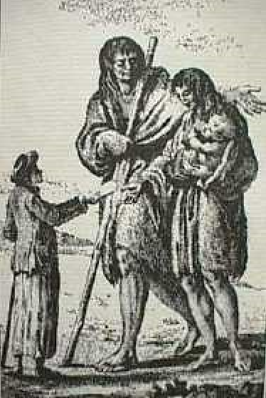 A sailor giving a Patagonian woman a piece of bread for her baby